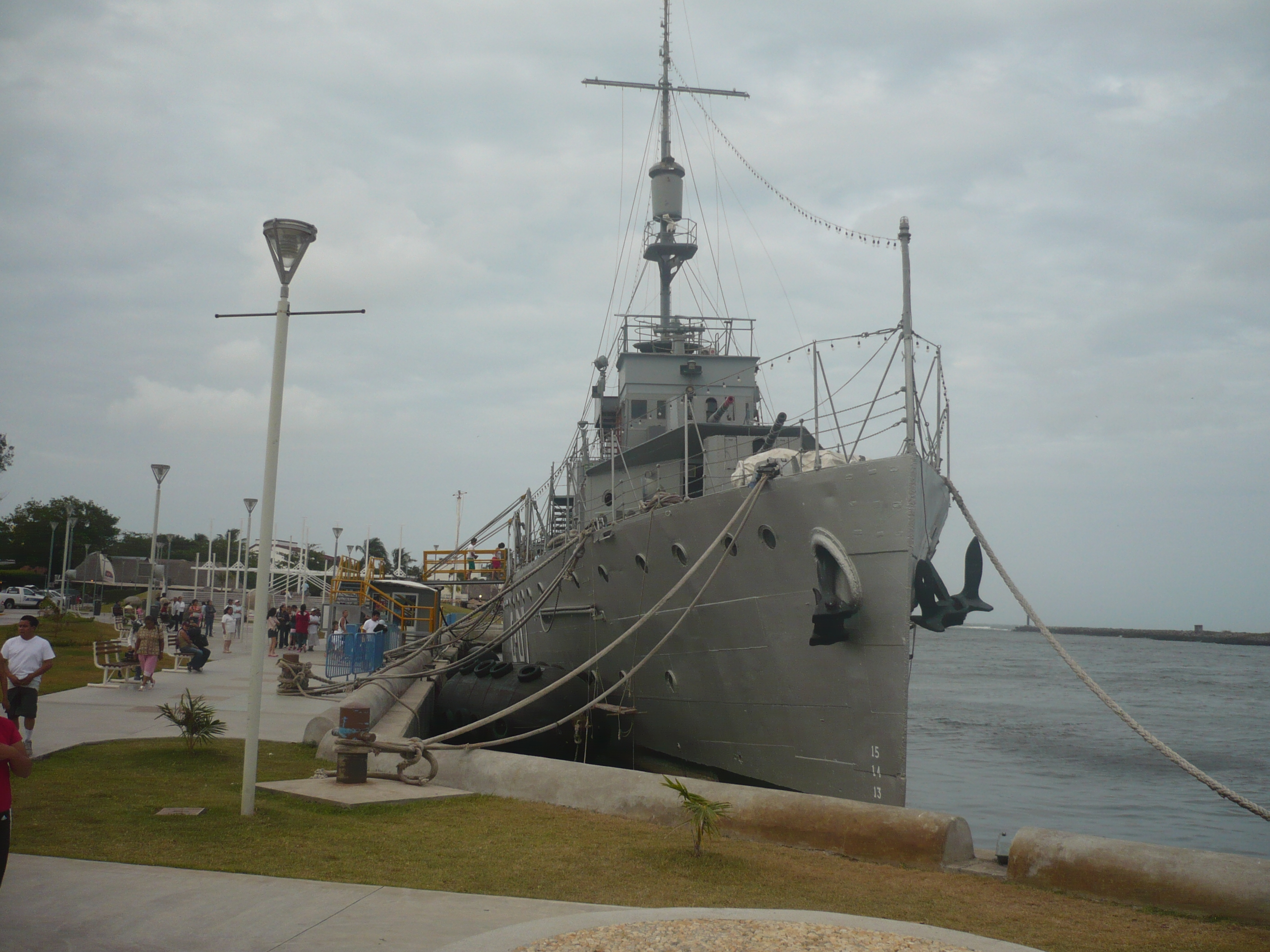 El Malecon de Boca del Rio, Ver.